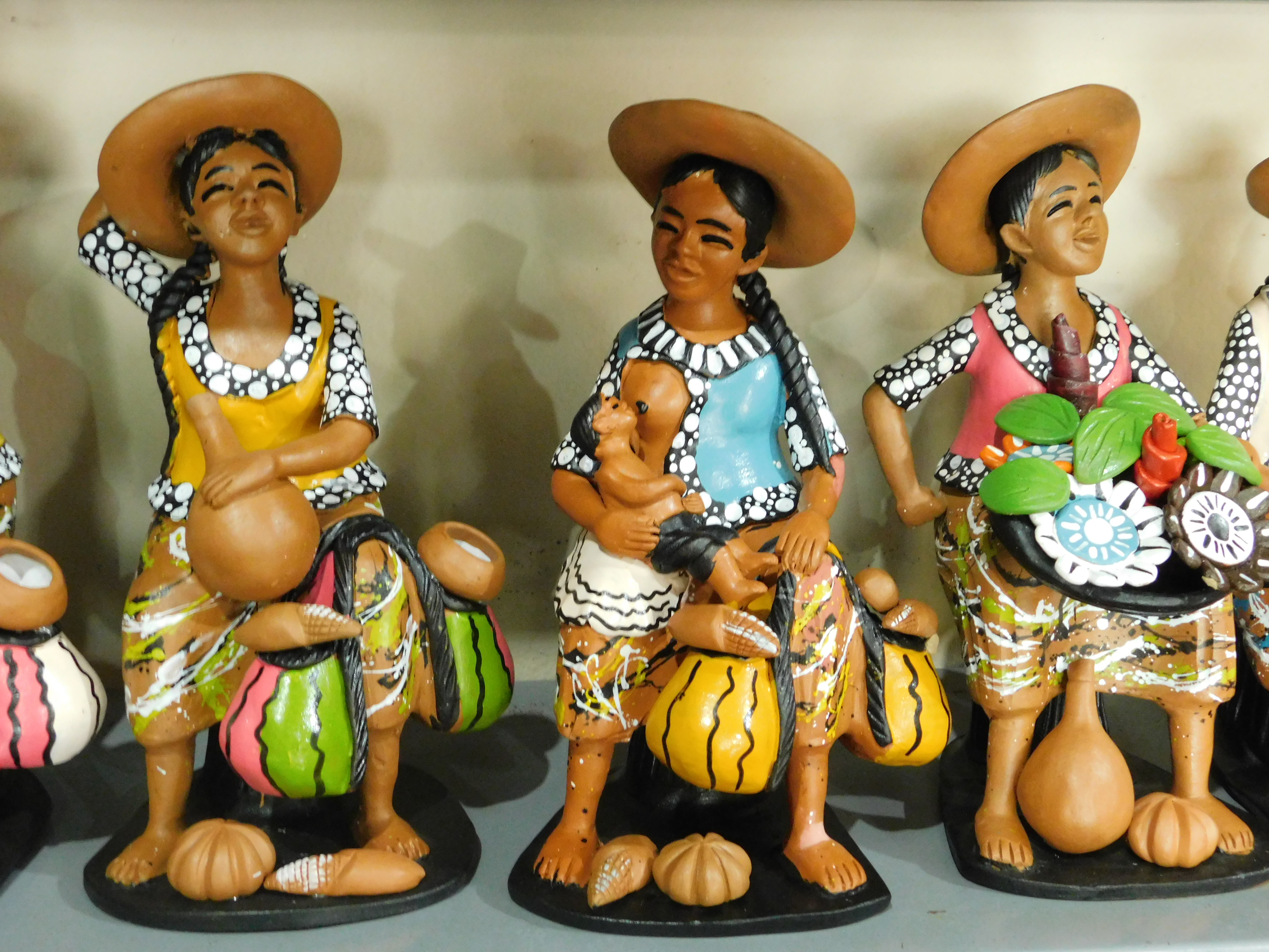 Ceramica tradicional de Chulucanas